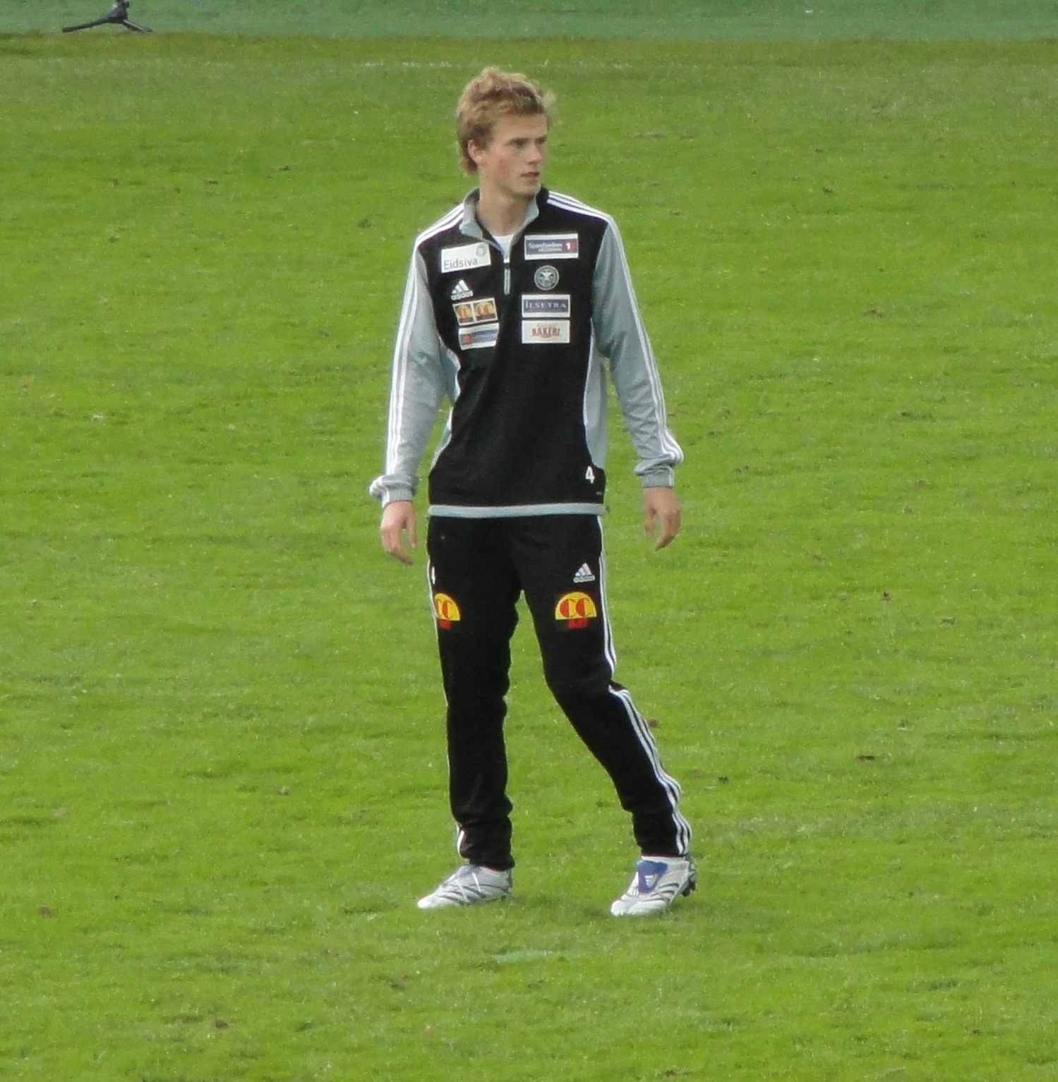 Bilde av Håkon Aalmen